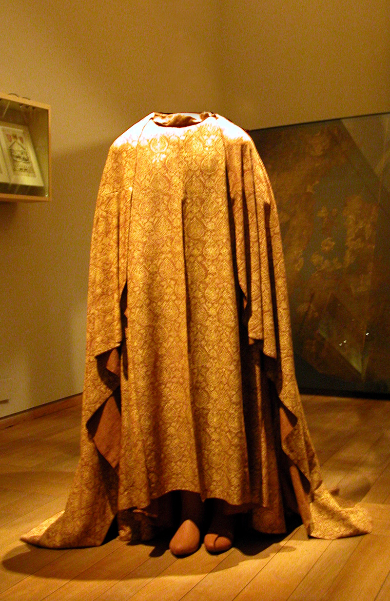 Veste di Cangrande I nell'urna